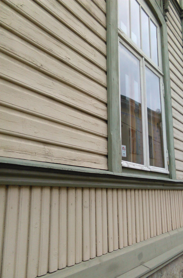 Vertikaallaudist kasutatakse fassaadil ka koos horisontaallaudisega. Tatari 21a, Tallinn